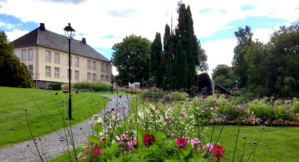 Brekkeparken hører til herregården Søndre Brekke gård i Skien. Museet er sommeråpent.